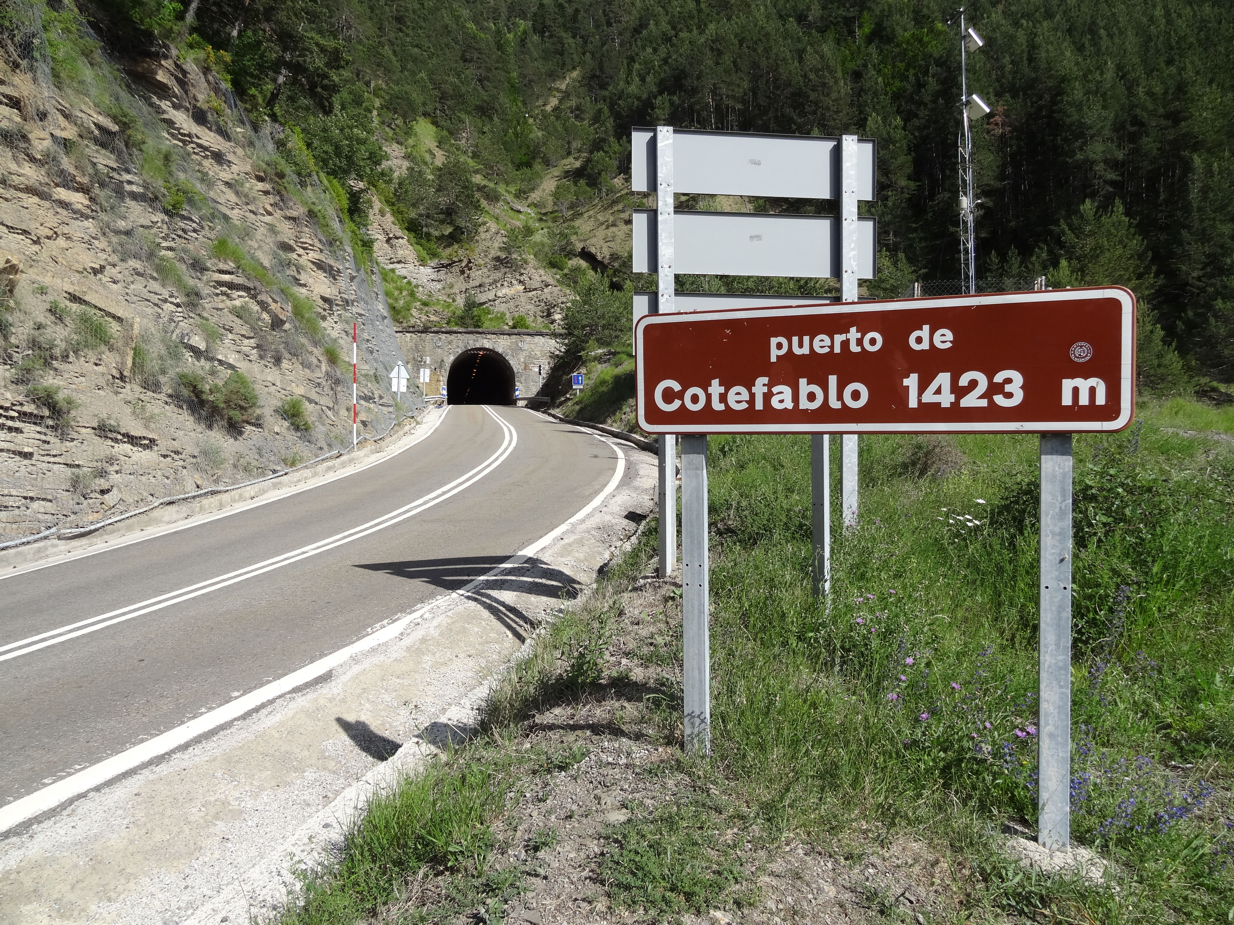 Túnel de Cotefablo